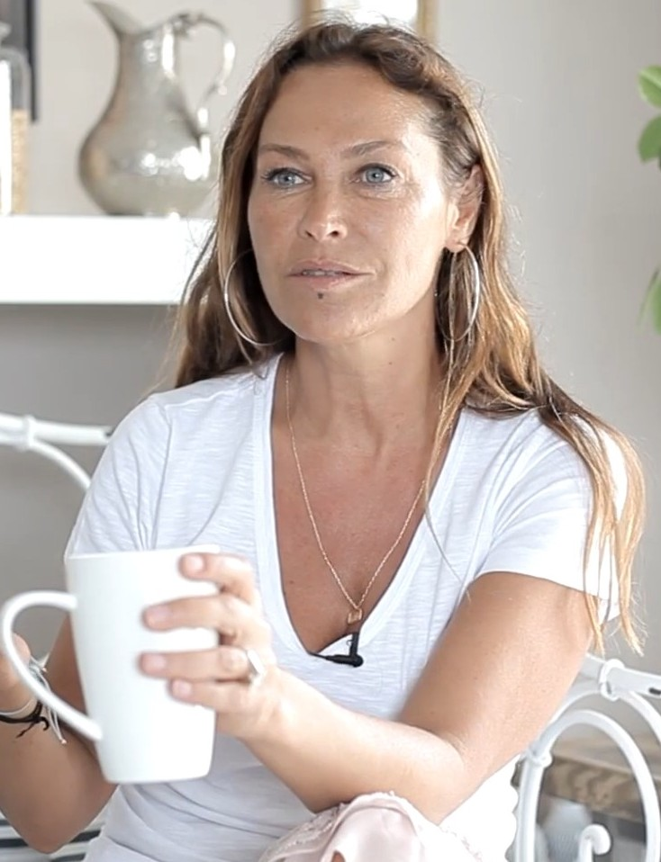 Hülya Avşar'ın yer aldığı Loyka Productions tarafından üretilen videodan bir kare.